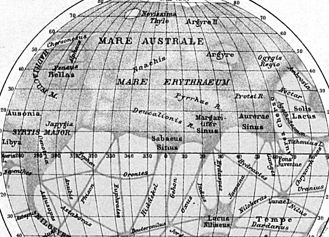 Extrait de la carte de Mars dessinée par Schiaparelli issu de La Planète Mars et ses conditions d'habitabilité de Flammarion.